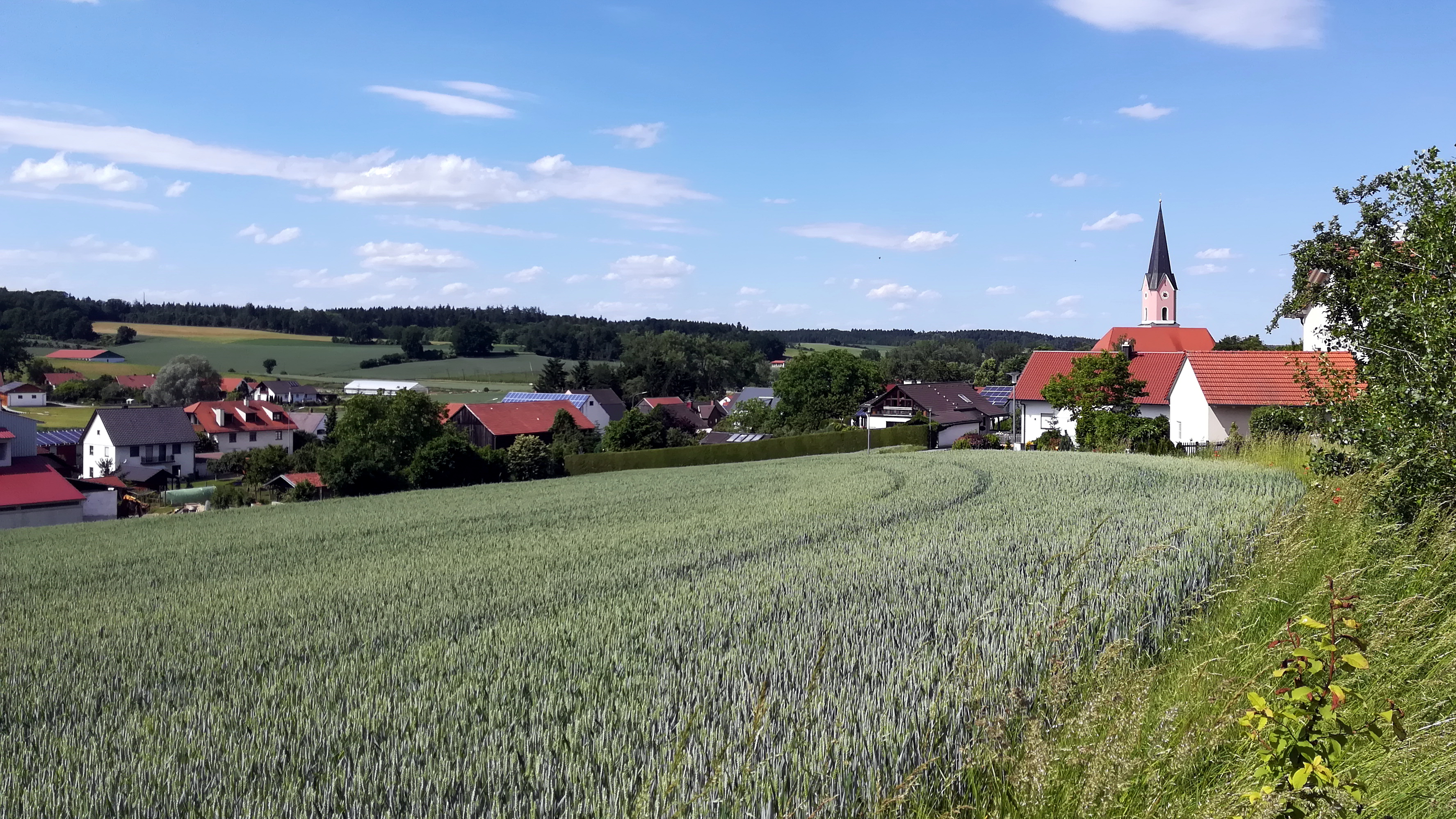 Oberhatzkofen ist ein Ortsteil der Stadt Rottenburg an der Laaber im niederbayerischen Landkreis Landshut. Bis 1978 bildete es eine selbstständige Gemeinde.